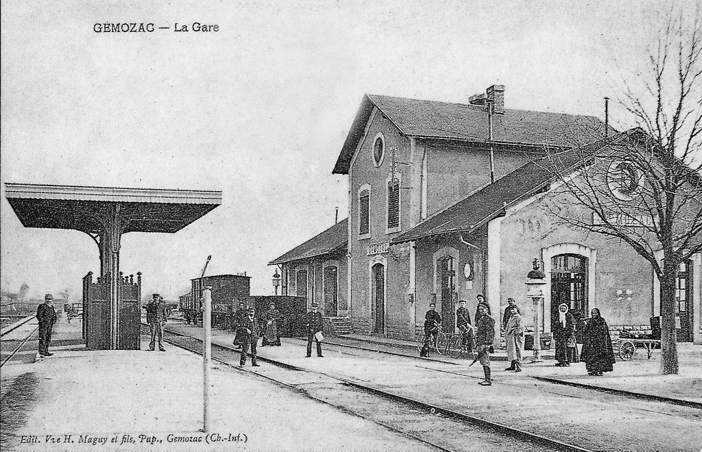 Intérieur de la gare avec le bâtiment principal, la halle à marchandises accolées et le quai central avec son abri.